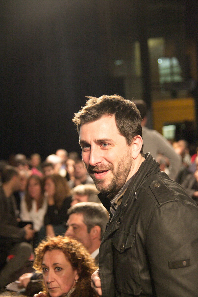 Toni Comin, durant l'acte de presentació de la candidatura d'Alfred Bosch a l'Alcaldia de Barcelona. Cotxeres de Sants, 11-12-2014